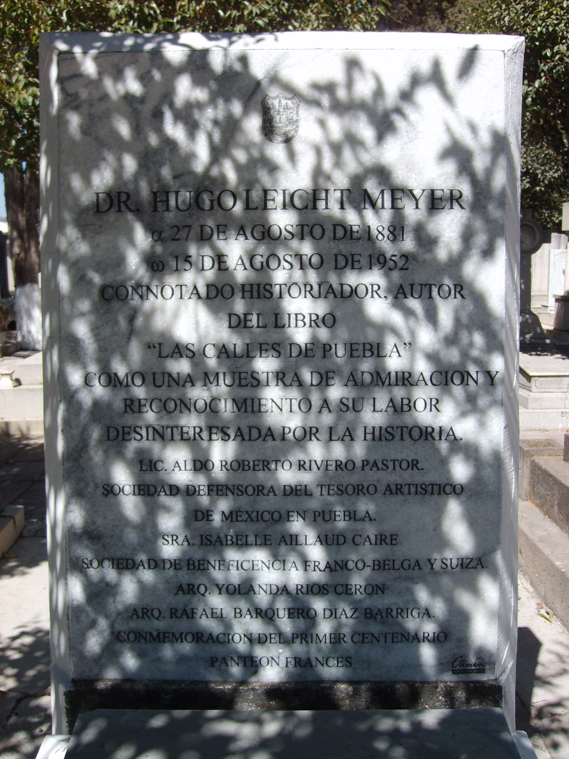 La lápida funeraria del Dr. Hugo Leicht, autor del libro Las Calles de Puebla.